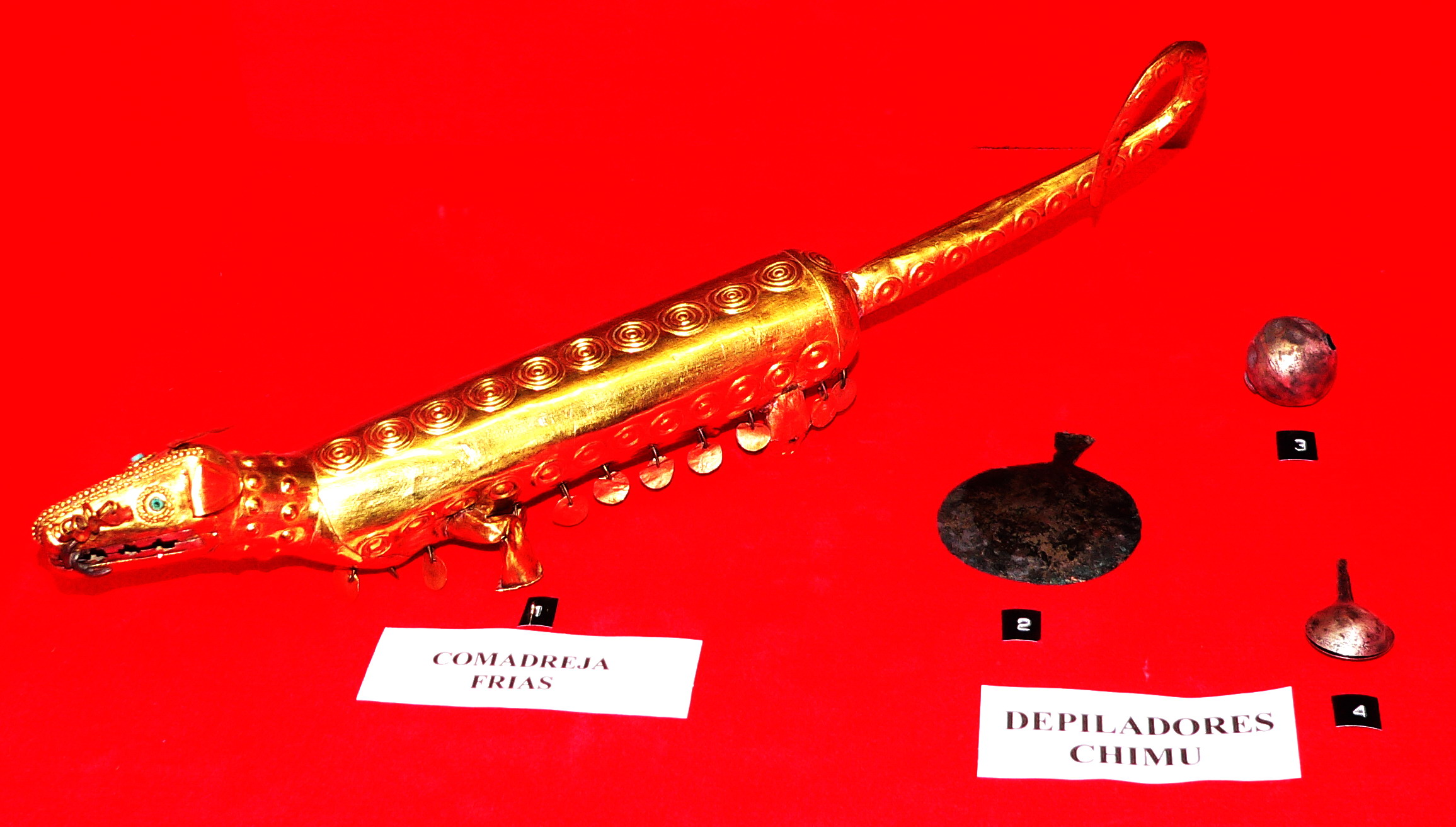 Descripción: Comadreja Cultura: Frías (100 a.C. – 100 d.C.) Fundación: Fundación Miguel Mujica Gallo Museo: Museo Oro del Perú y Armas del Mundo Lugar: Lima, Perú Fotógrafo: © Manuel González Olaechea y Franco Fecha : 13 de julio de 2007